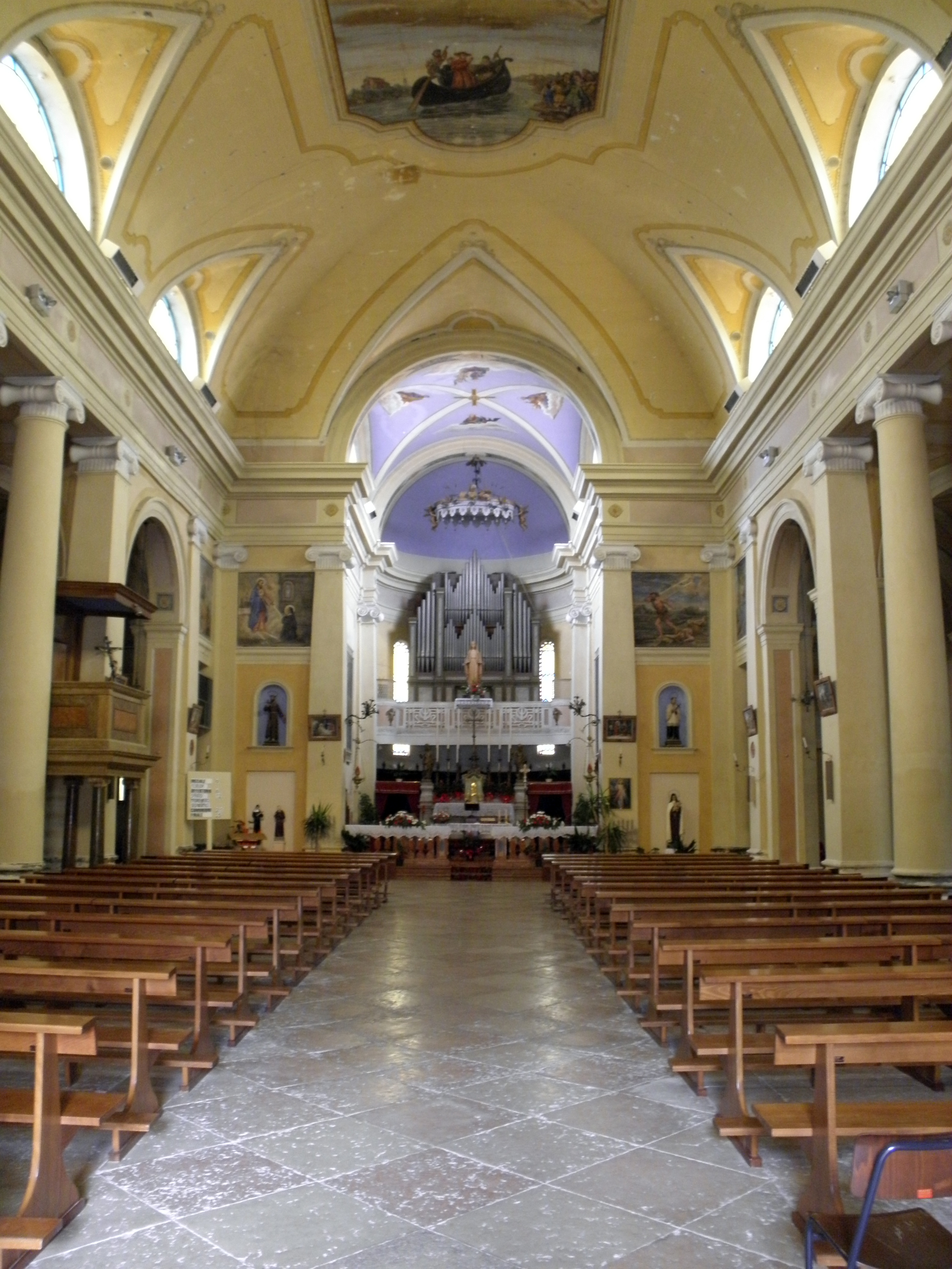 Papozze, chiesa parrocchiale di San Bartolomeo: interno, navata.